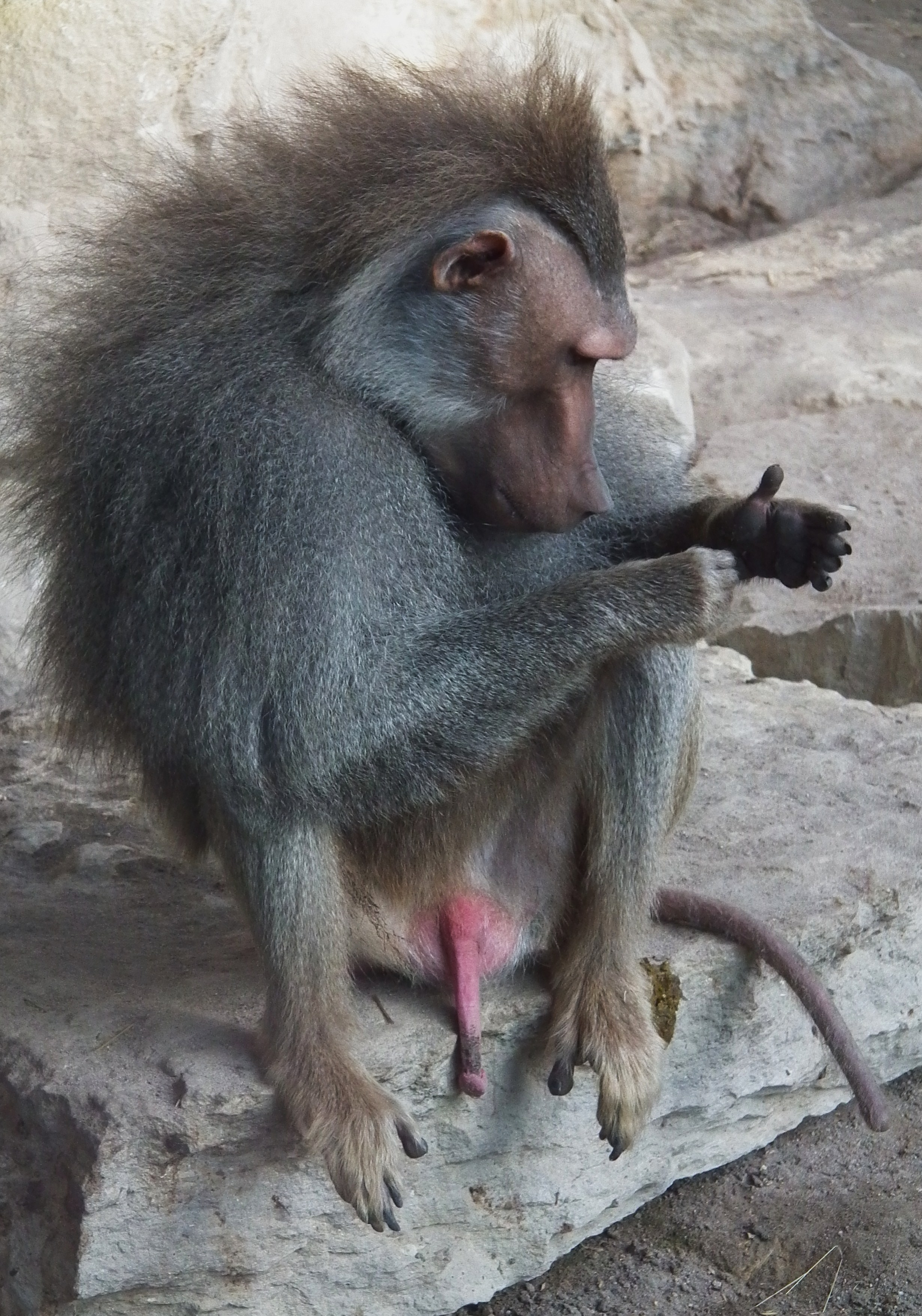 Mantelpavian (Papio hamadryas) im Tiergarten Worms (Rheinland-Pfalz, Deutschland)